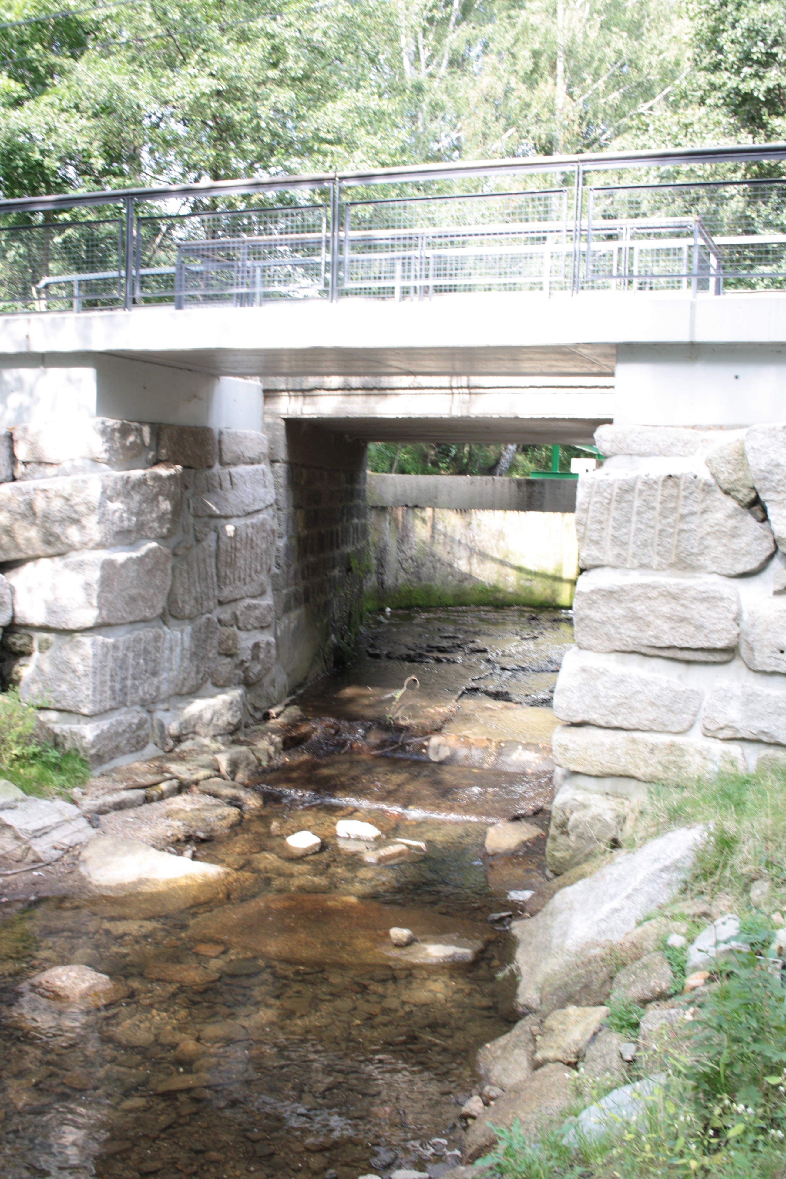 This photograph was taken with a DSLR from WMCZ's Camera grant. Most na ulici Mníšecké v jihovýchodních partiích vodní nádrže Fojtka.